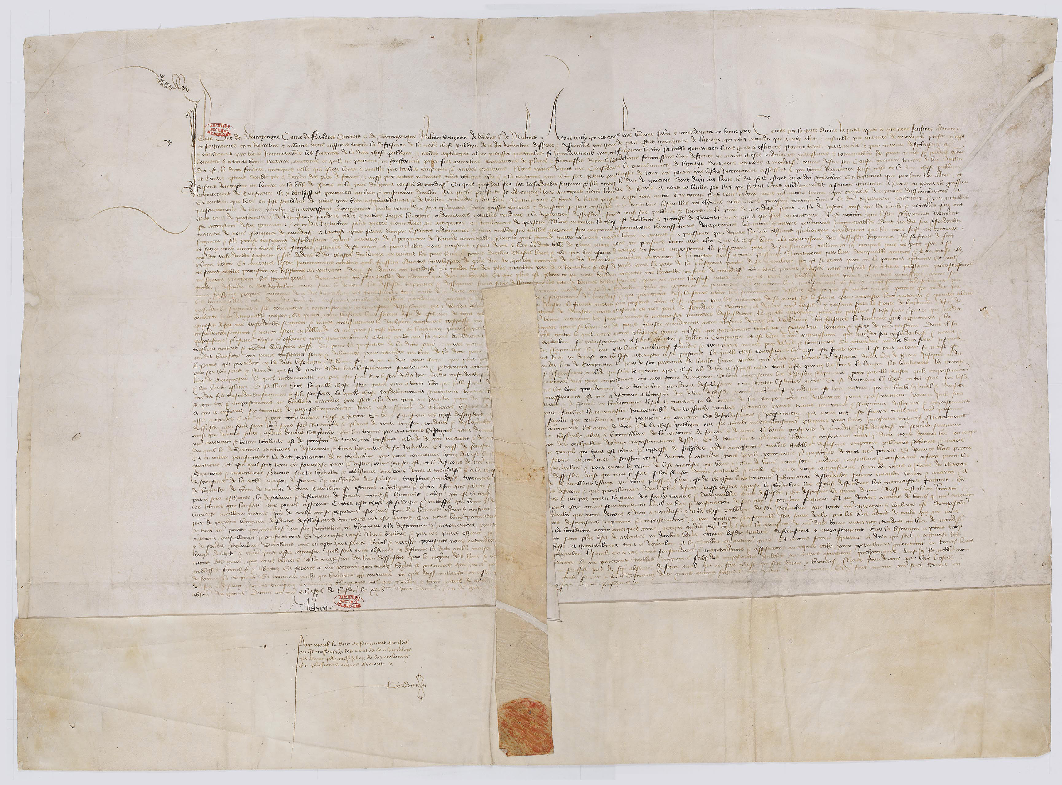 Manifeste de Jean Sans Peur, duc de Bourgogne pour appeler les sujets du roi à se joindre à lui contre les ennemis de la chose publique. Hesdin, 25 avril 1417